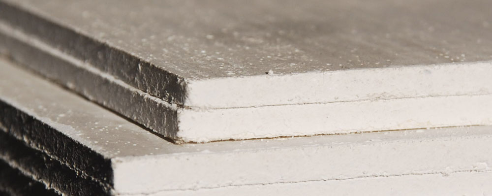 Płyty Mgo